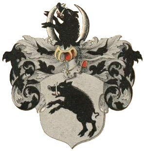 Bassewitzi suguvõsa aadlivapp